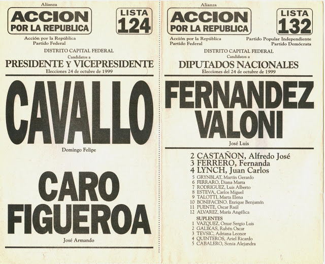 Boleta electoral de las elecciones presidenciales de Argentina de 1999 del partido Acción por la República con la fórmula Cavallo-Figueroa. Distrito Ciudad de Buenos Aires.